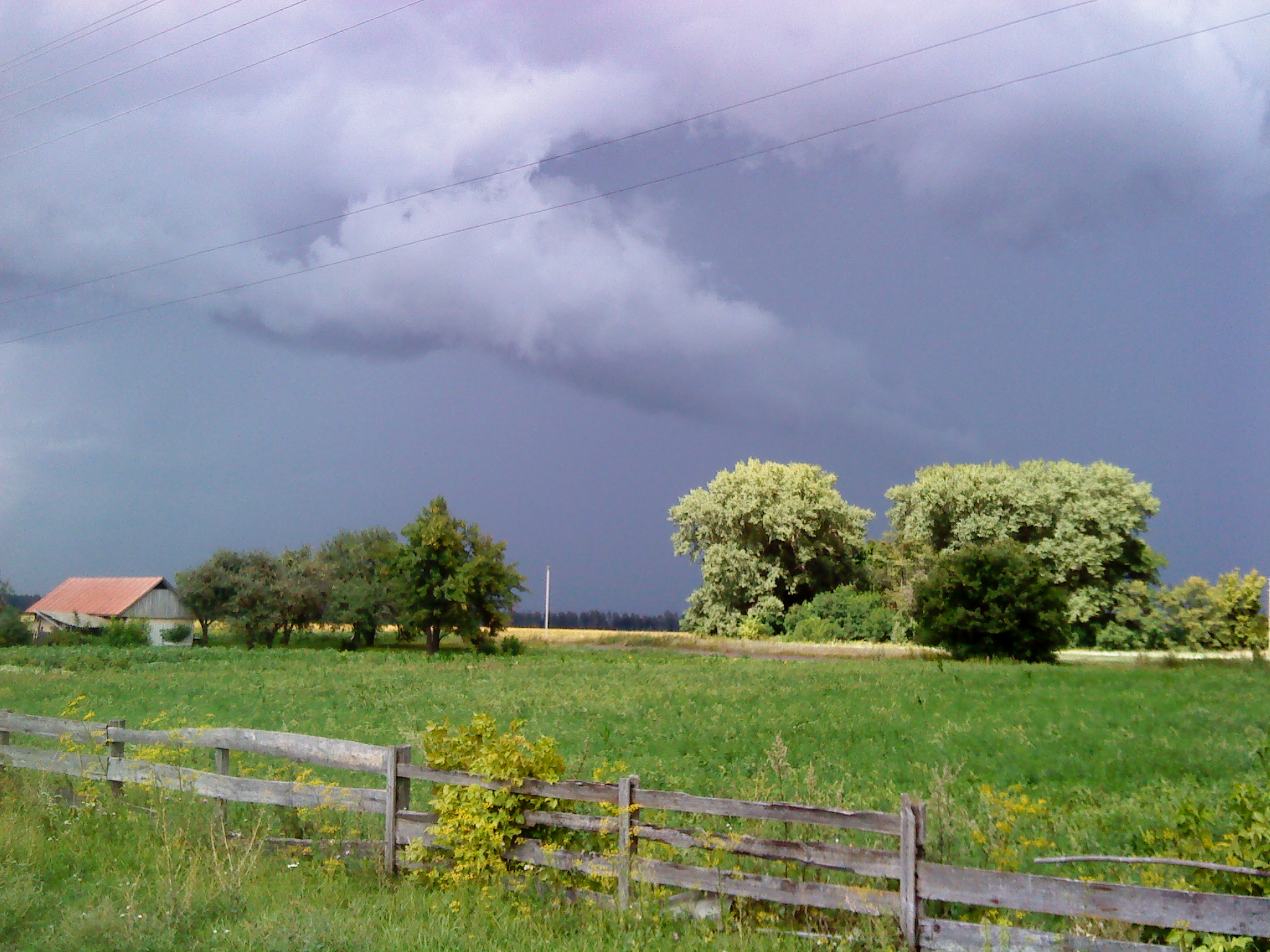 С. Першотравневе. Вигляд в бік Романчуків